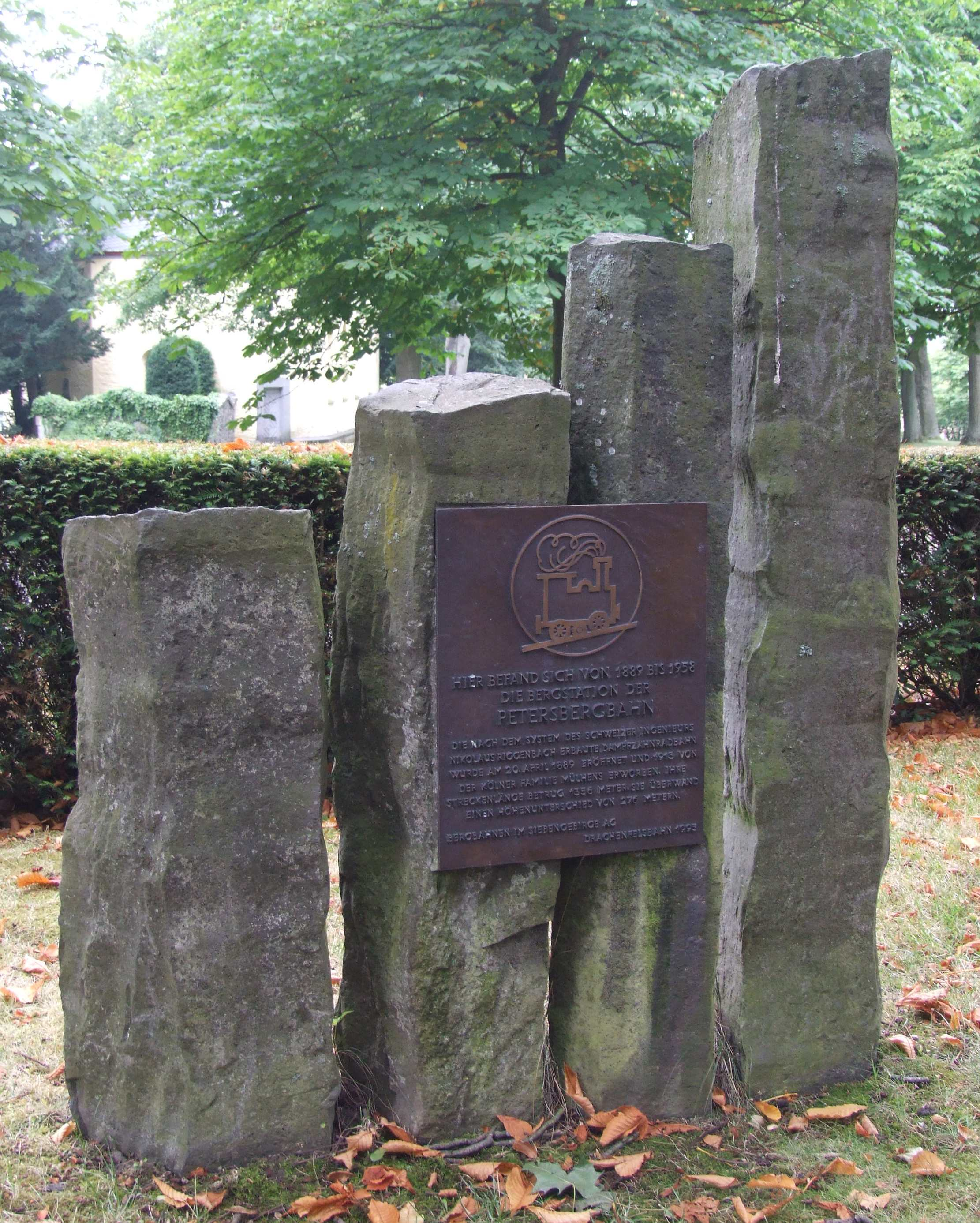 Bergstation der ehemaligen Petersbergbahn